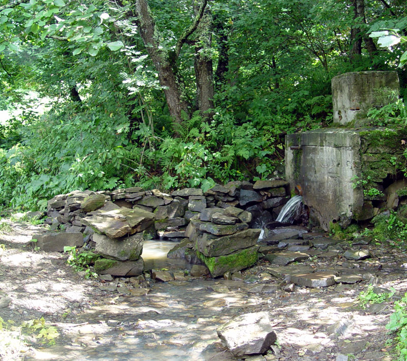 Святой источник возле Южного Зеленчукского храма, Нижне-Архызский историко-архитектурный и археологический комплекс. Карачаево-Черкессия. Музей-заповедник.